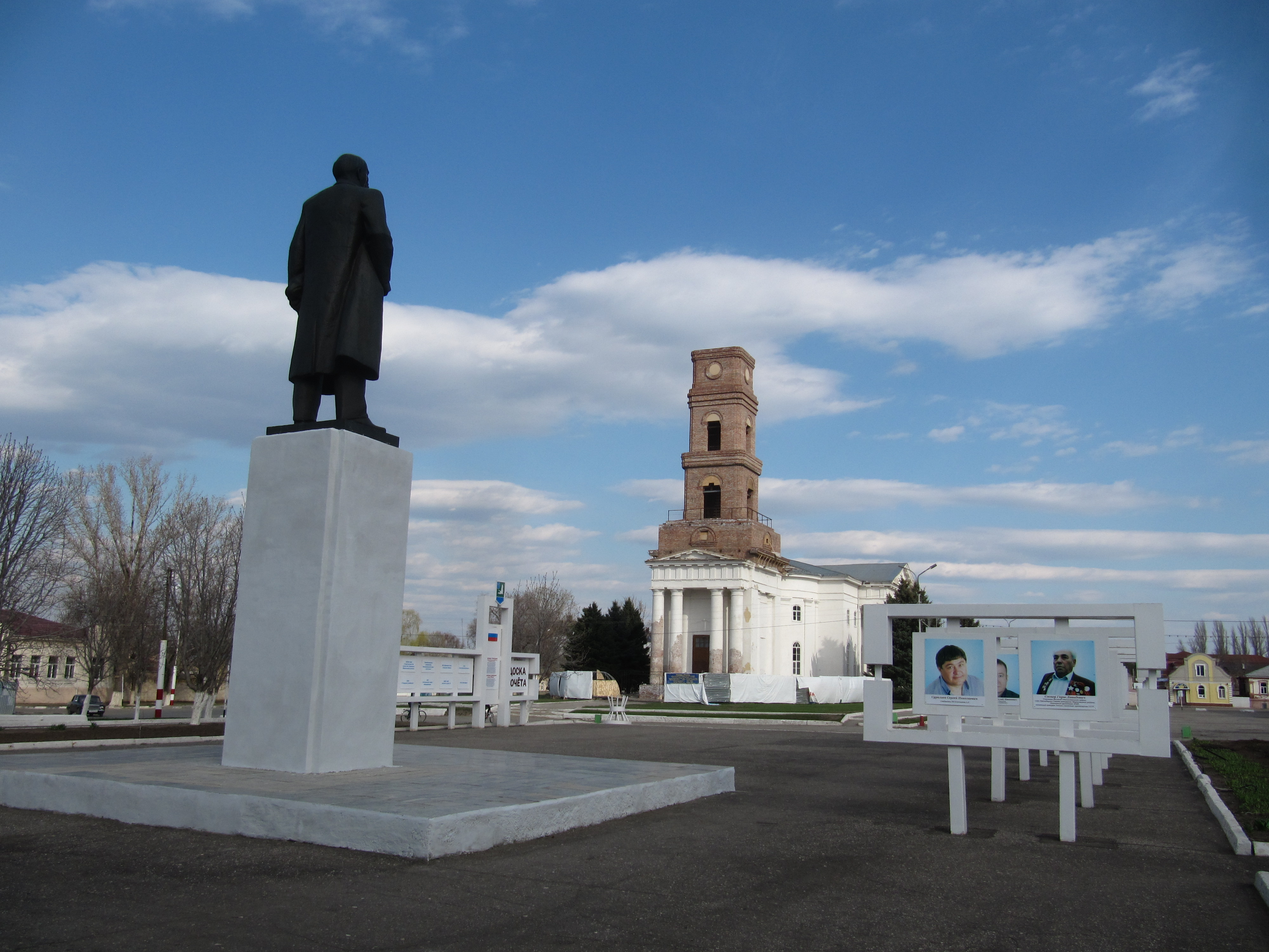 Памятник Ленину и лютеранская церковь в Марксе